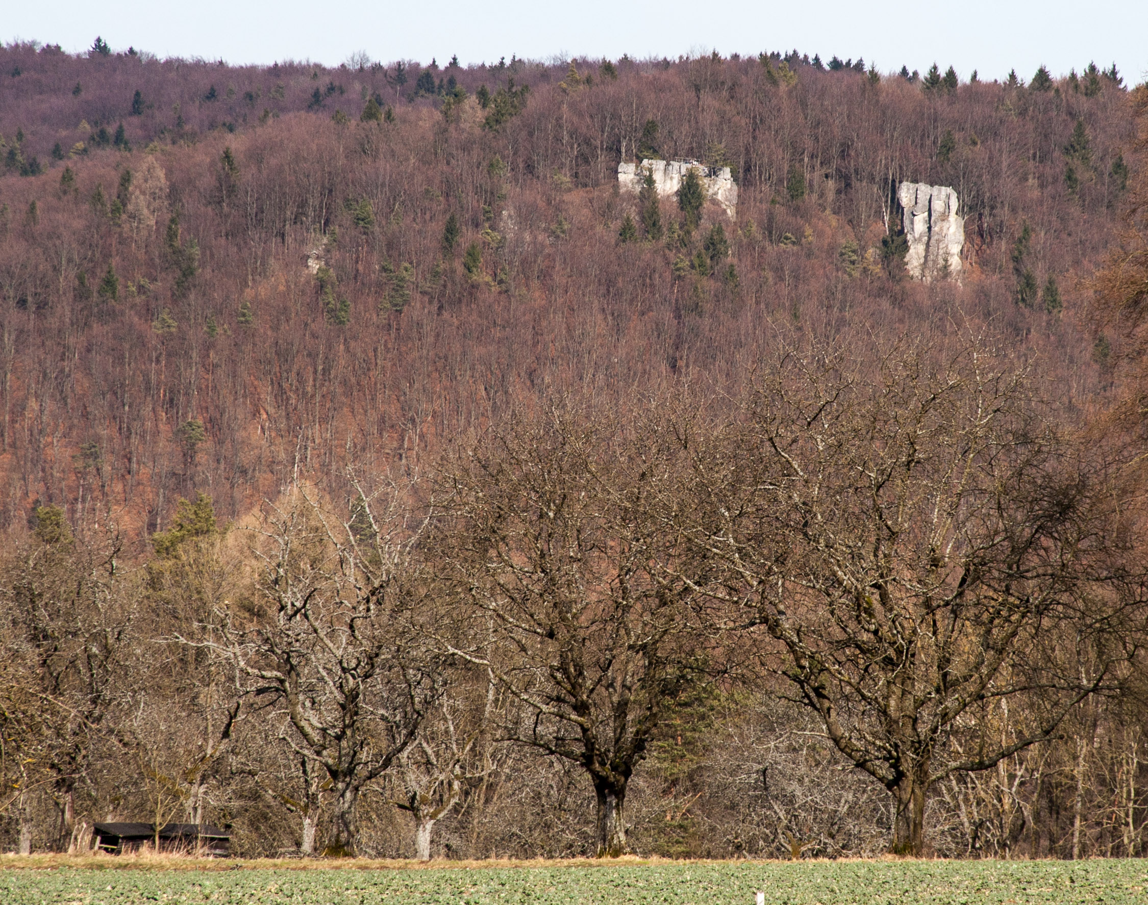 Geotop, Fels, Pommelsbrunn